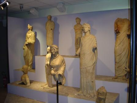 Ex voto dal Santuario di Minerva di Lavinium (Pratica di Mare - Pomezia. Museo archeologico)